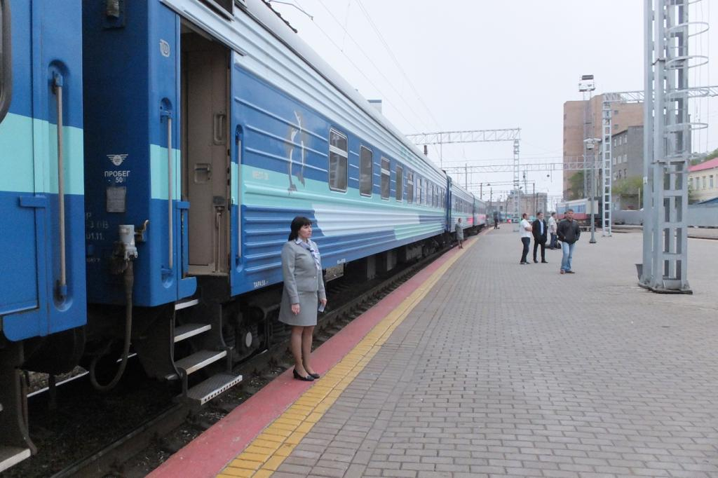 Поезд «Океан» на вокзале Владивостока.